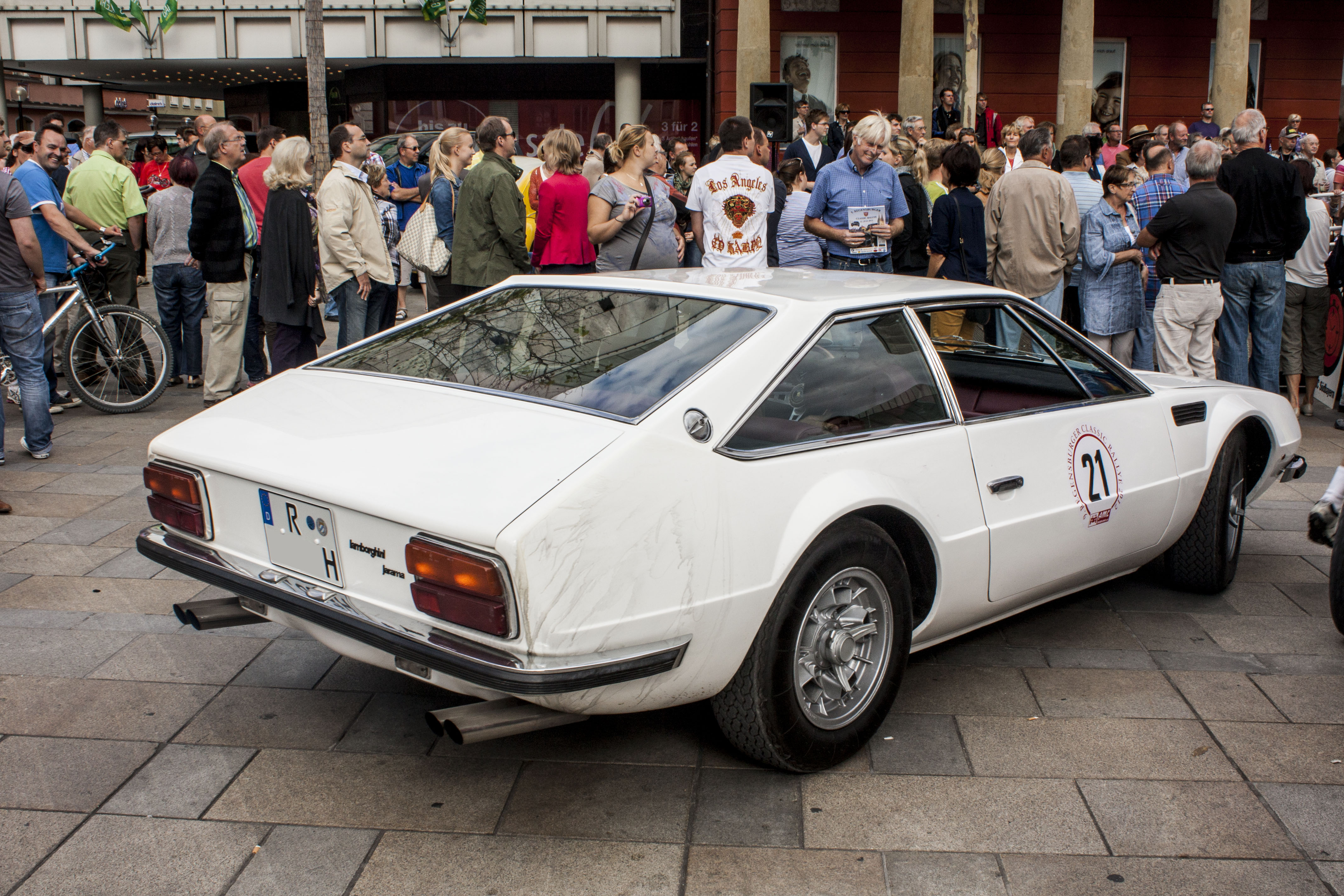 Lamborghini Jarama 400 GT (Bj. 1971)